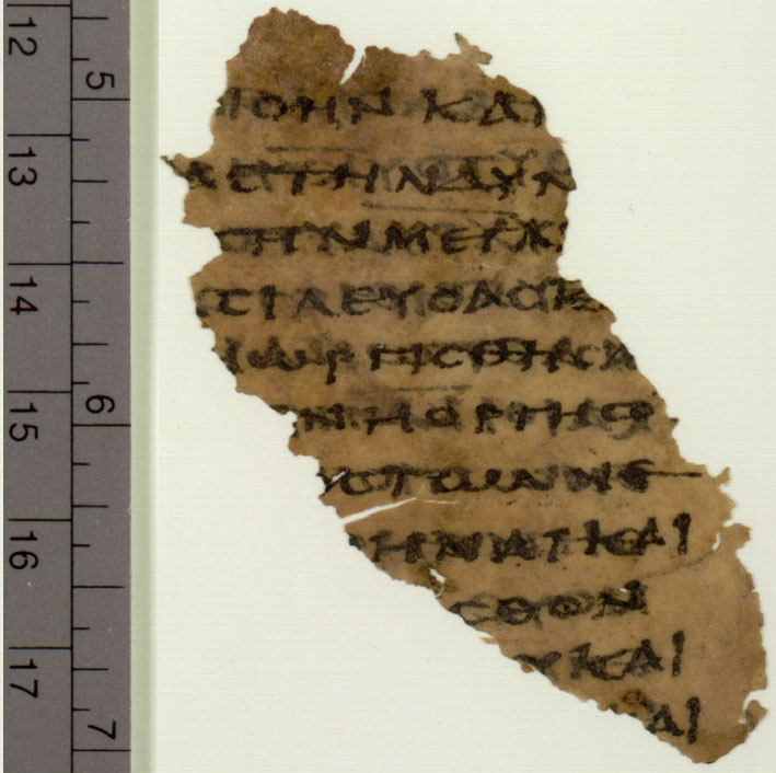 Uncial 0308 (Gregory-Aland), P. Oxyrhynchus 4500, hair side